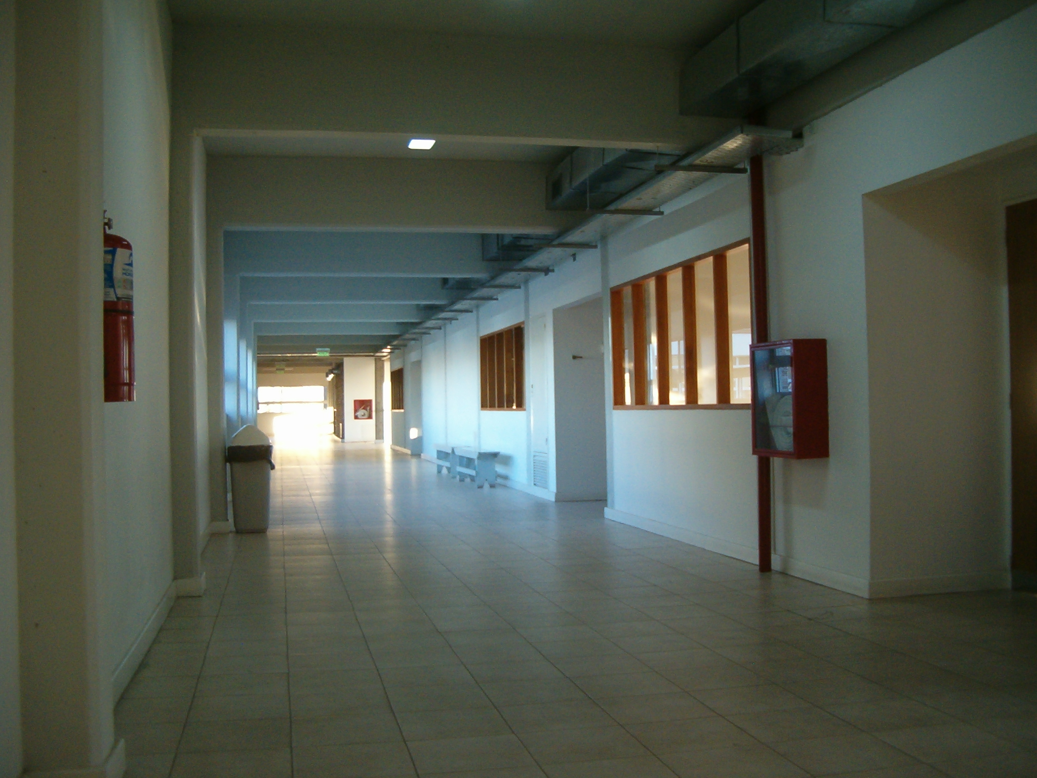 Vista del primer piso del ala nueva de la Facultad Regional Haedo de la Universidad Tecnológica Nacional, Argentina